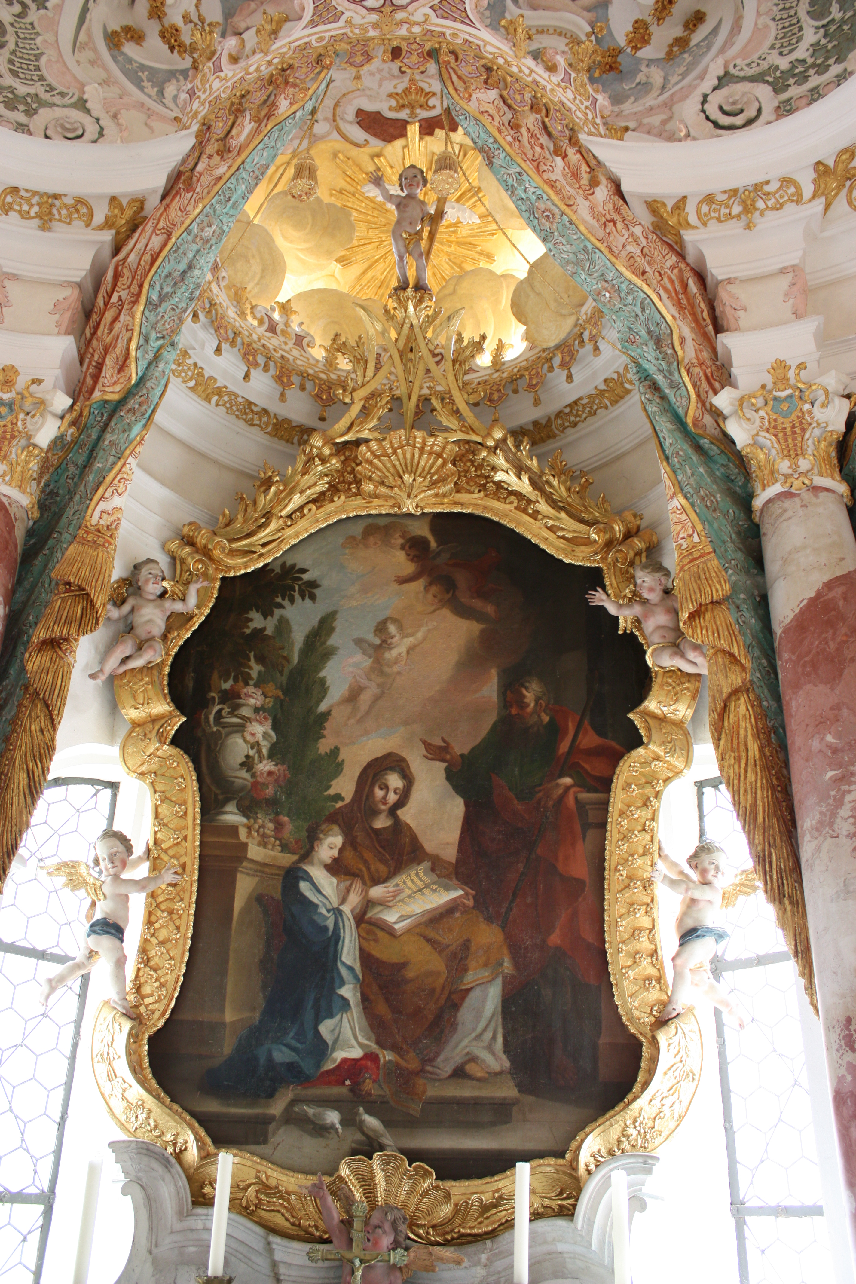 St. Annakapelle in der ehemaligen Klosterkirche der Kartause in Buxheim bei Memmingen